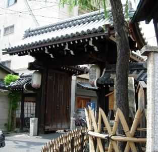 撮影者：上田隼人(投稿者) 撮影日：2004年9月1日